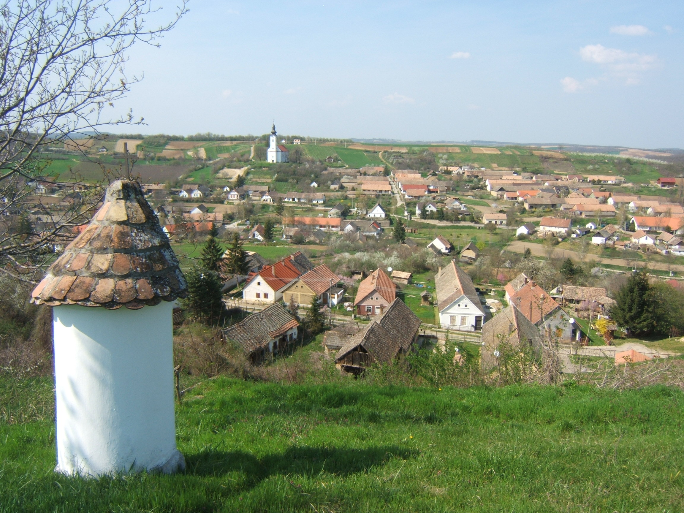 Kilátás Závodra a kálváriától